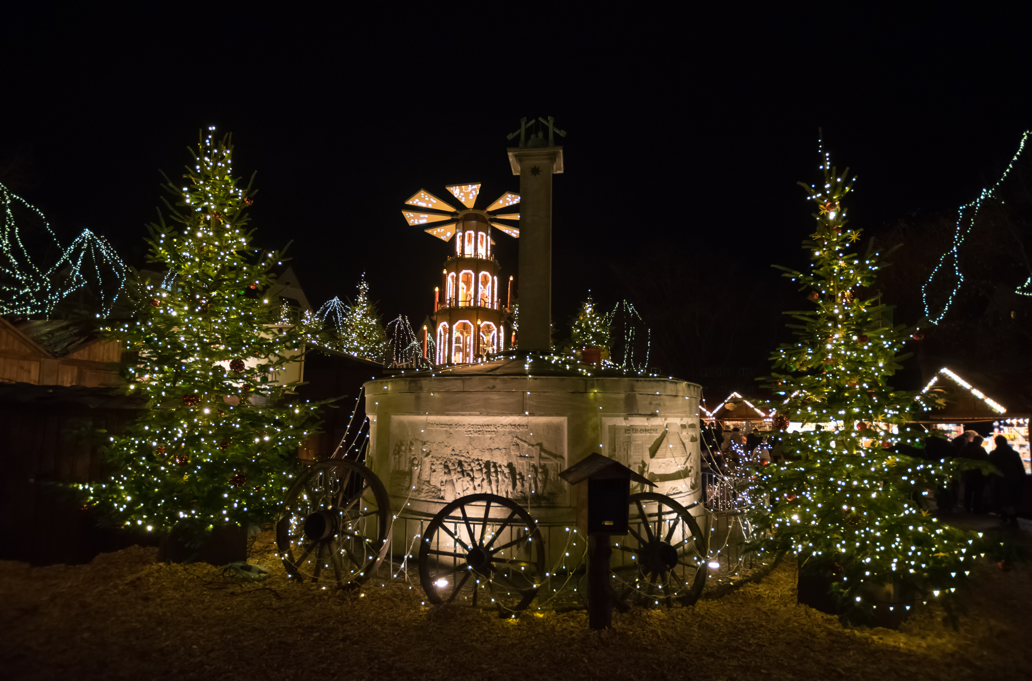 Bad Salzufler Weihnachtssmarkt 2015